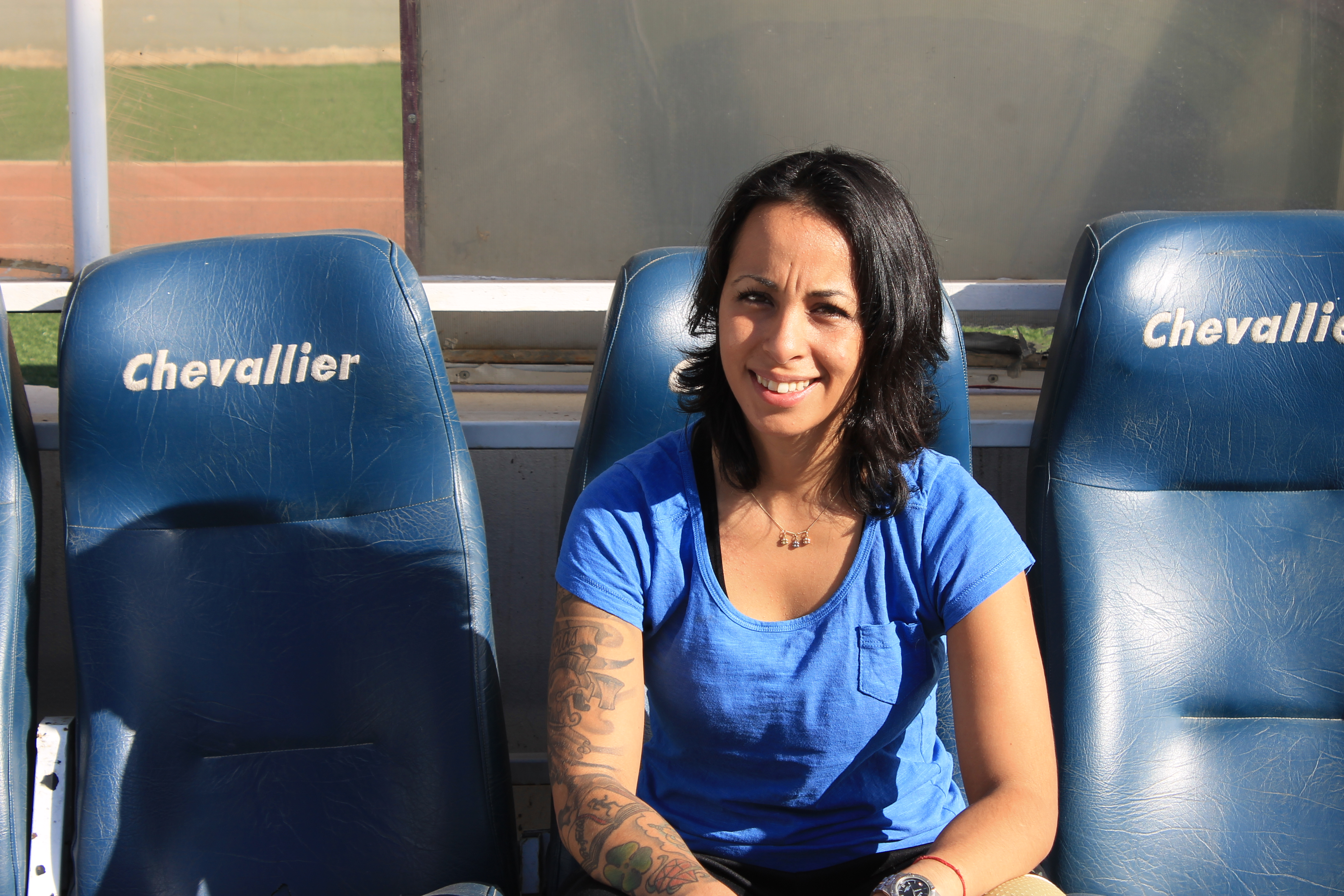 foto de evelina cabrera sentada en un banco de suplentes